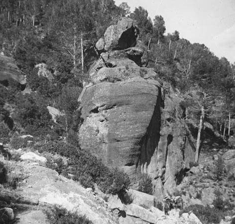 Roca de l'Ós vora el riu Glorieta. Frederic Bordas i Altarriba (ca. 1890)